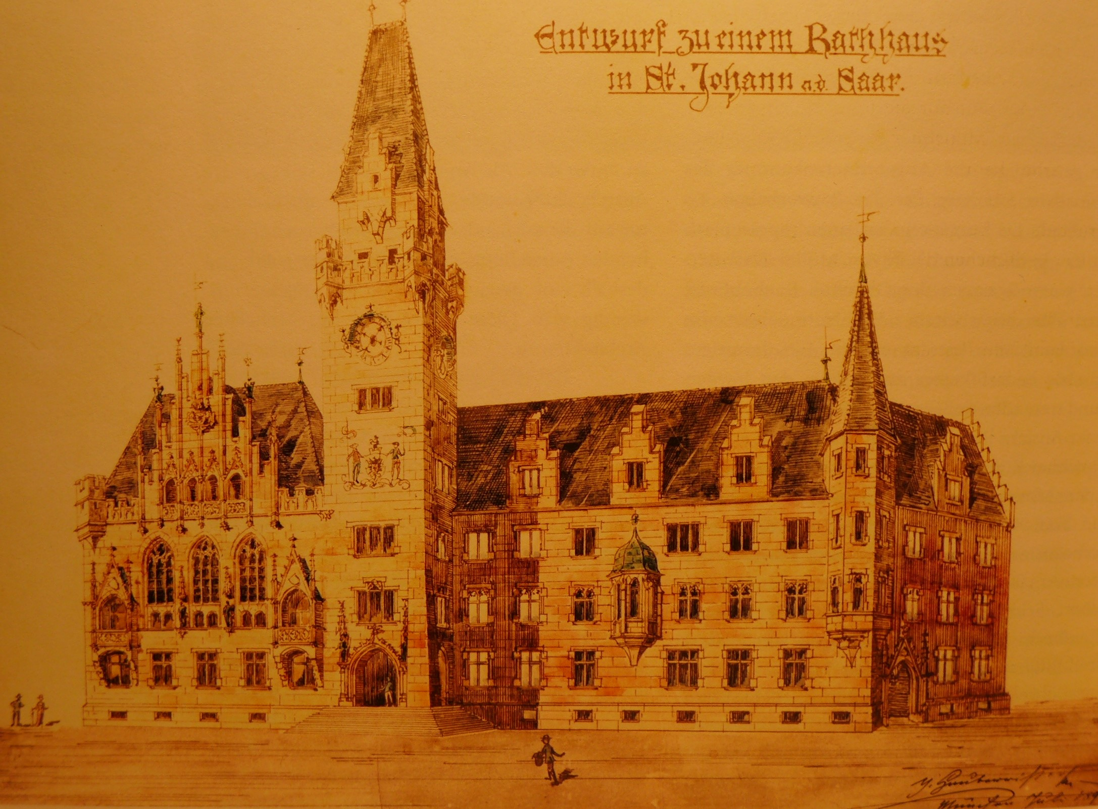 Georg von Hauberrisser, Erster Enwurf vom Juli 1896 zum Neubau des Rathauses in St. Johann an der Saar (Stadtarchiv Saarbrücken)